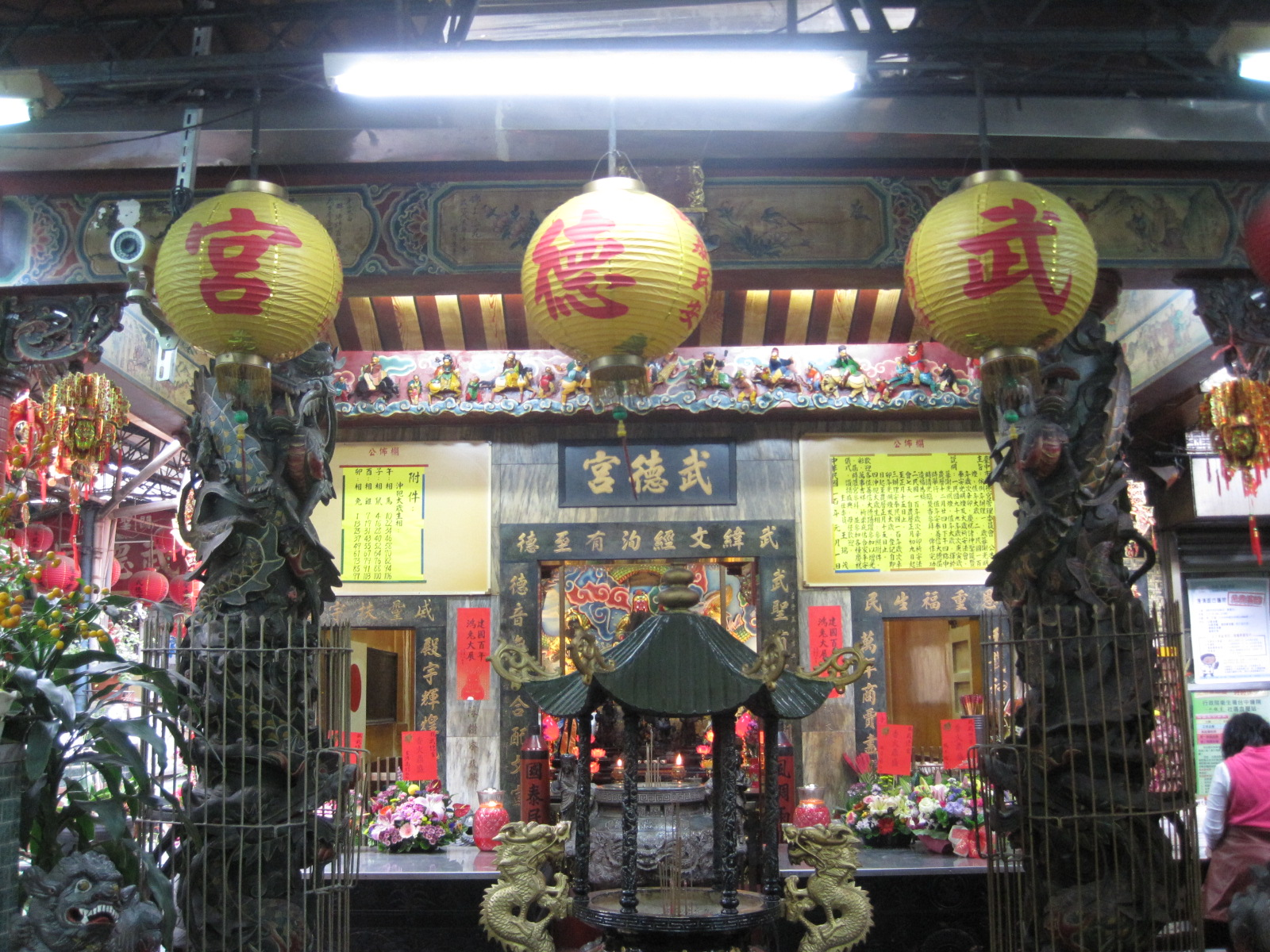 臺中第二市場的武德宮